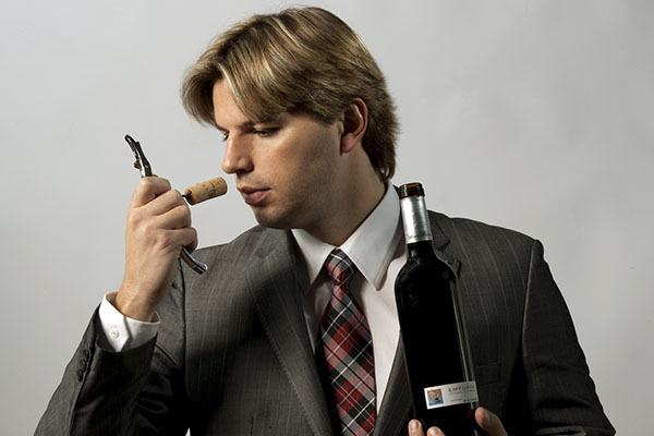 Sommelier